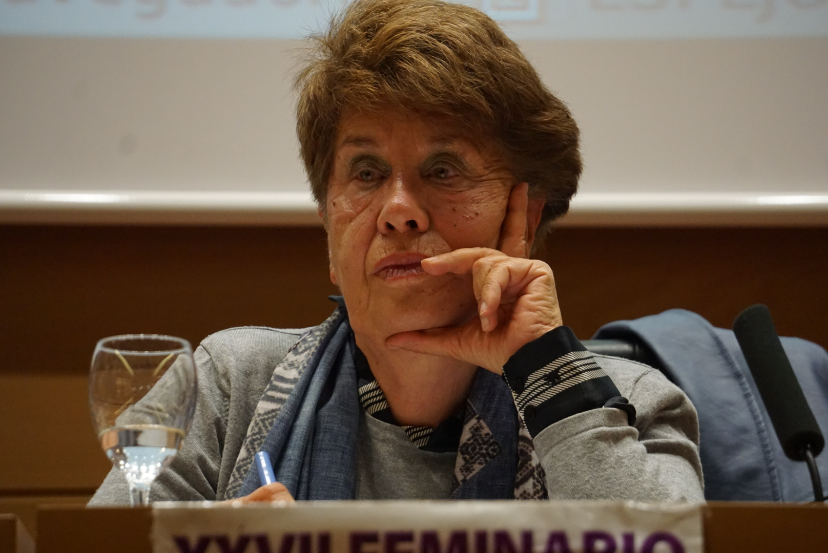 Victoria Sendón en el Feminario 2016. Córdoba